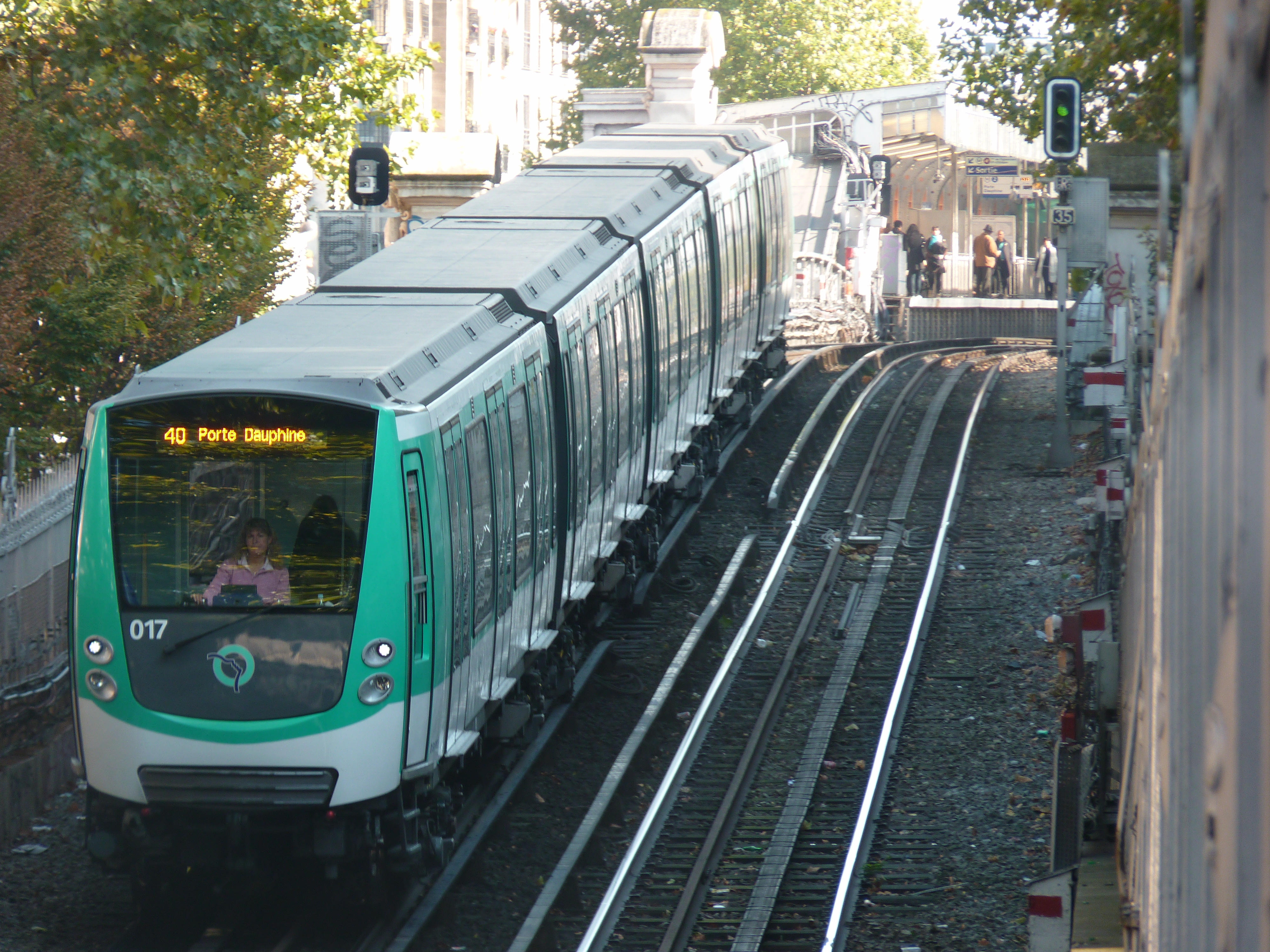 Un MF 01 quitte la station Barbès - Rochechouart en direction de Porte Dauphine sur la ligne 2.